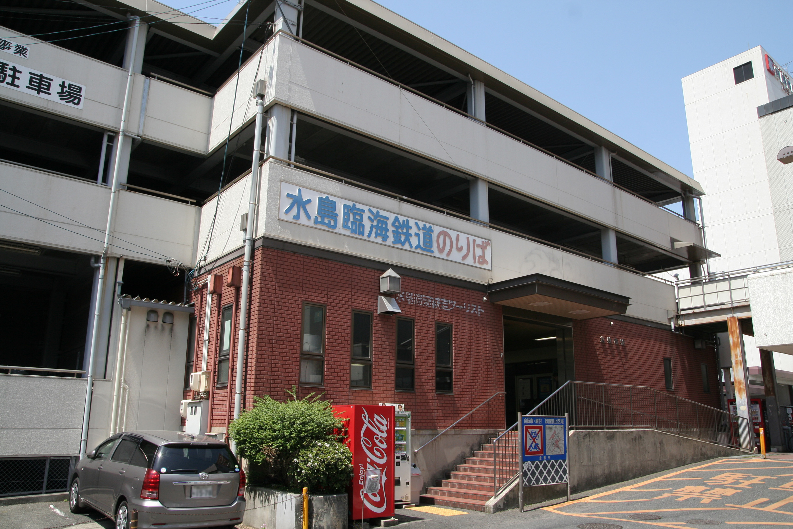 水島臨海鉄道倉敷市駅